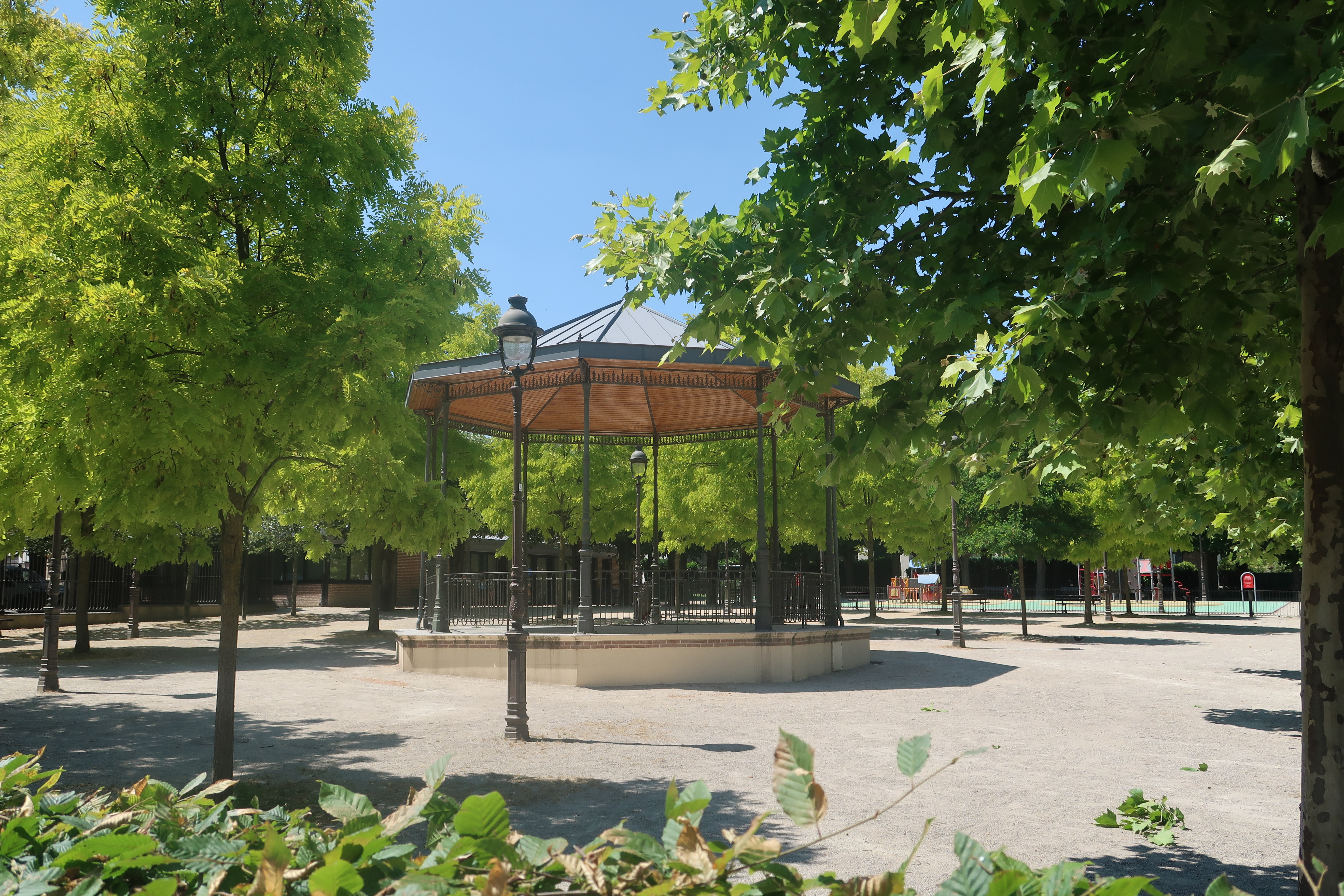 Square des Bels-Ébats à Suresnes (Hauts-de-Seine).